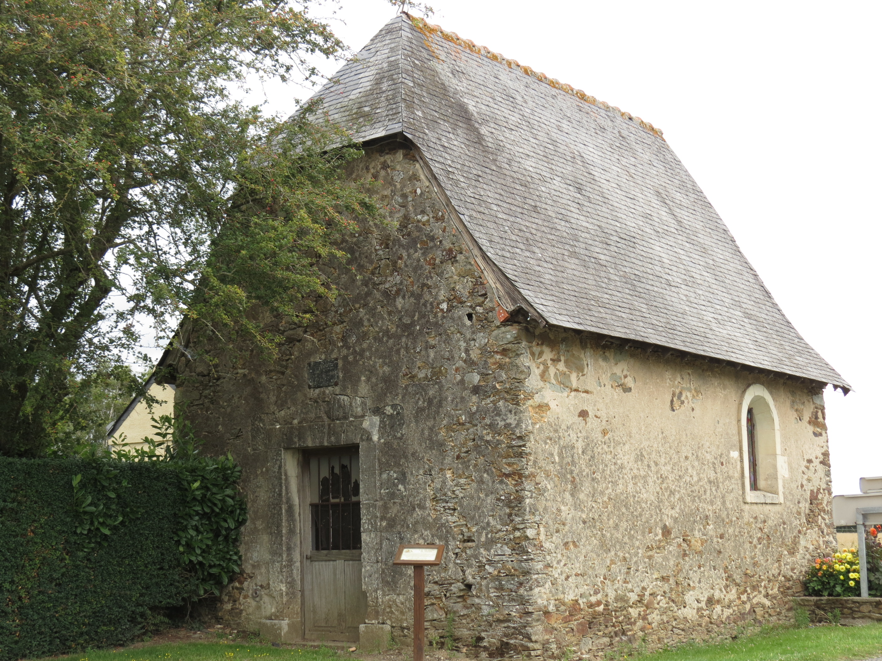 Chapelle du Buron au Bourg d'Iré. Extérieur.